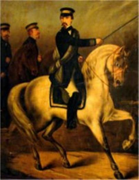 Tableau représentant l'état-major libéral lors de la bataille de Cerro Grande, 29 avril 1859, Chili